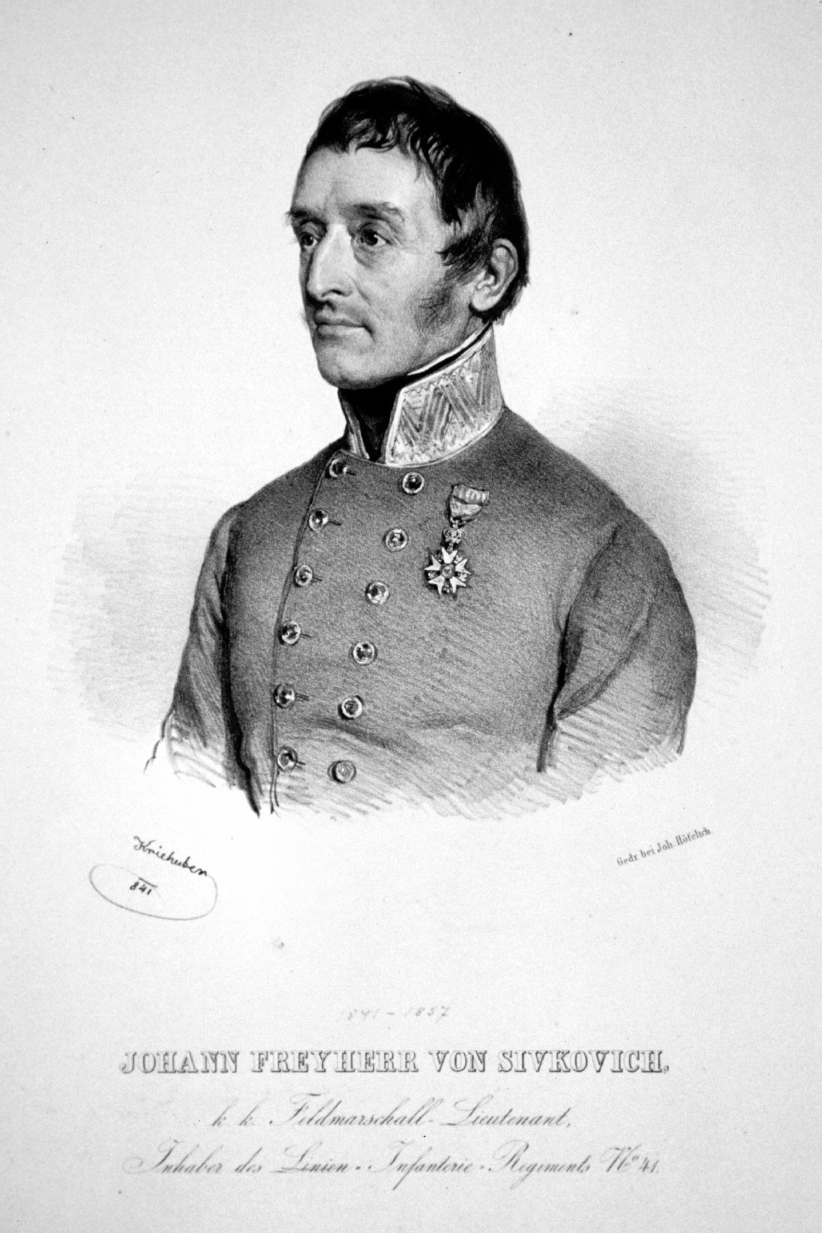 Johann Sivkovich (1779-1857), k. k. Feldmarschalleutnant